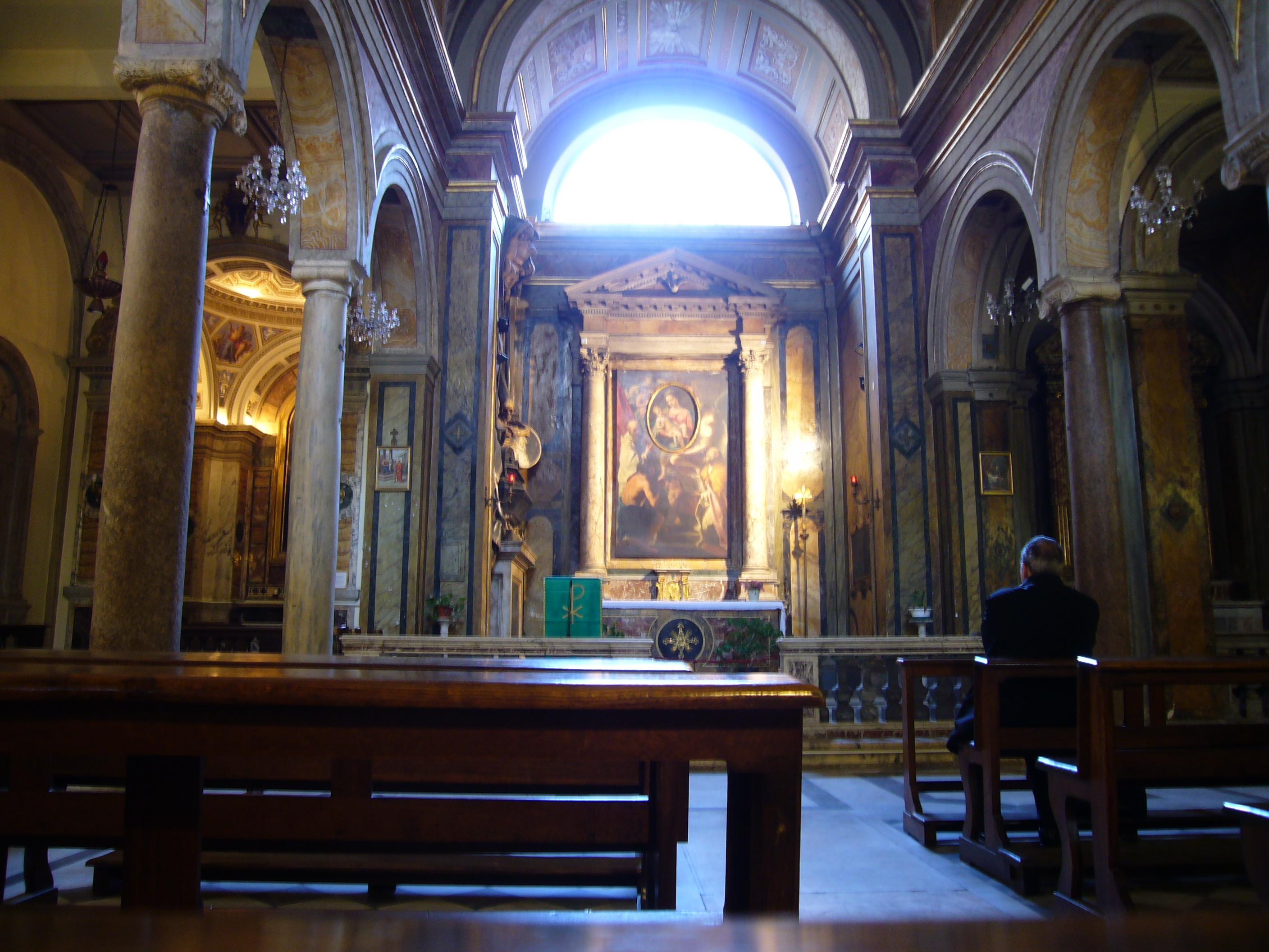 Roma, santa Maria in Monterone, interno